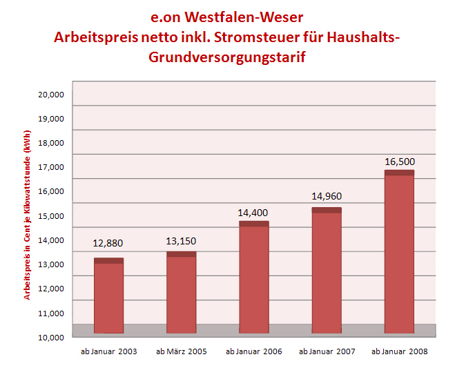 Beispiel für Strompreisentwicklung der e.on Westfalen-Weser AG 2003–2008. Arbeitspreise netto inkl. Stromsteuer in Cent je Kilowattstunde für einen Haushaltsgrundversorgungstarif.